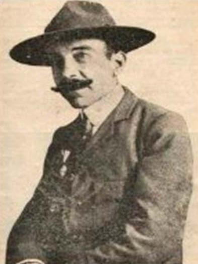 Teodoro Iradier, fundador de los Exploradores de España